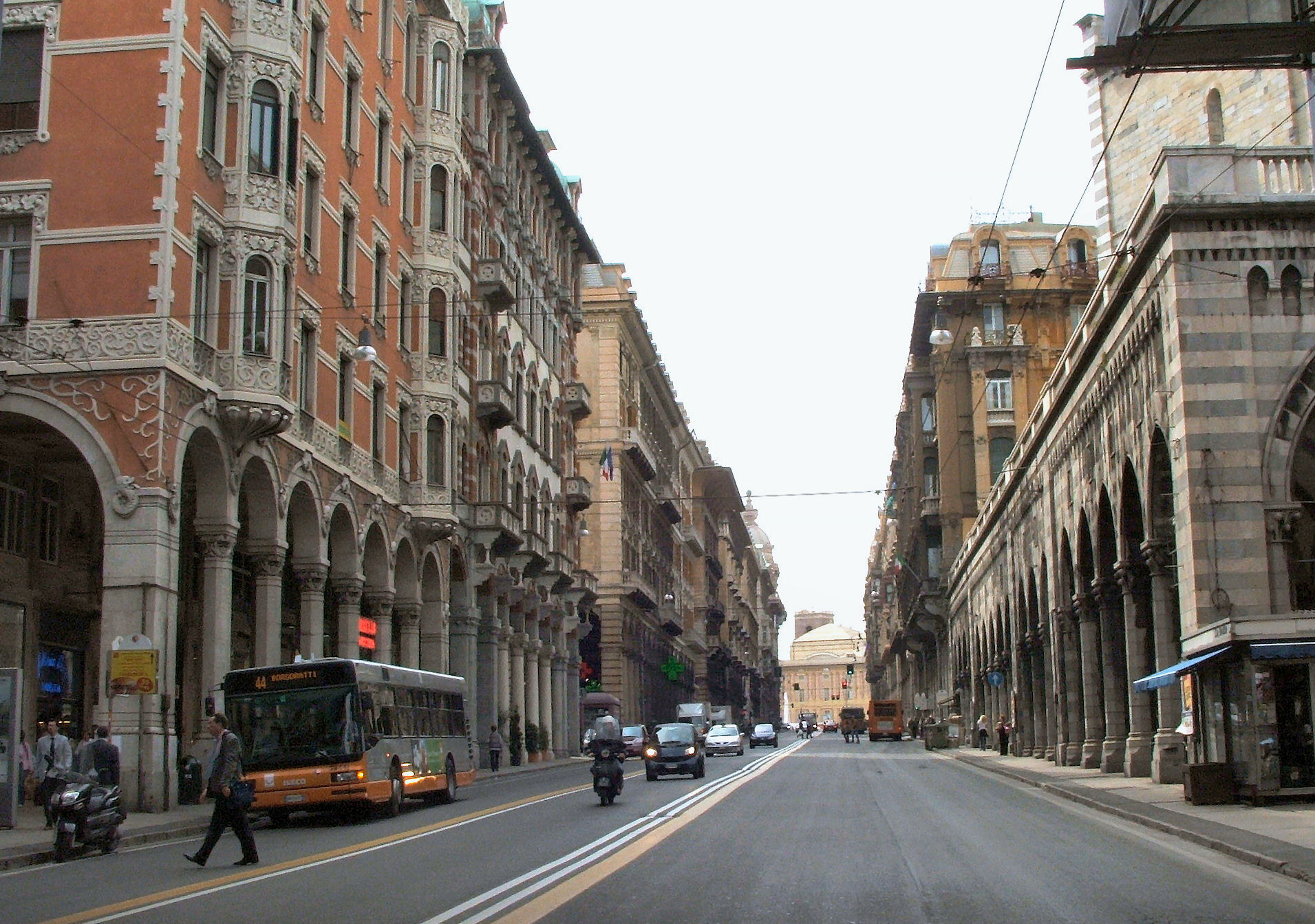 Genova, Via XX Settembre dal Ponte Monumentale verso piazza De Ferrari (immagine derivata da Genova-via XX Settembre-DSCF7019.jpg già presente su Commons)